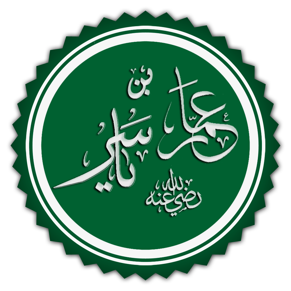 تخطيط اسم الصحابي عمار بن ياسر ملحوق بدعاء الرضا عنه